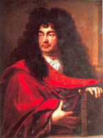 Montfleury, portrait attribué à Lebrun. Collection Comédie-Française.